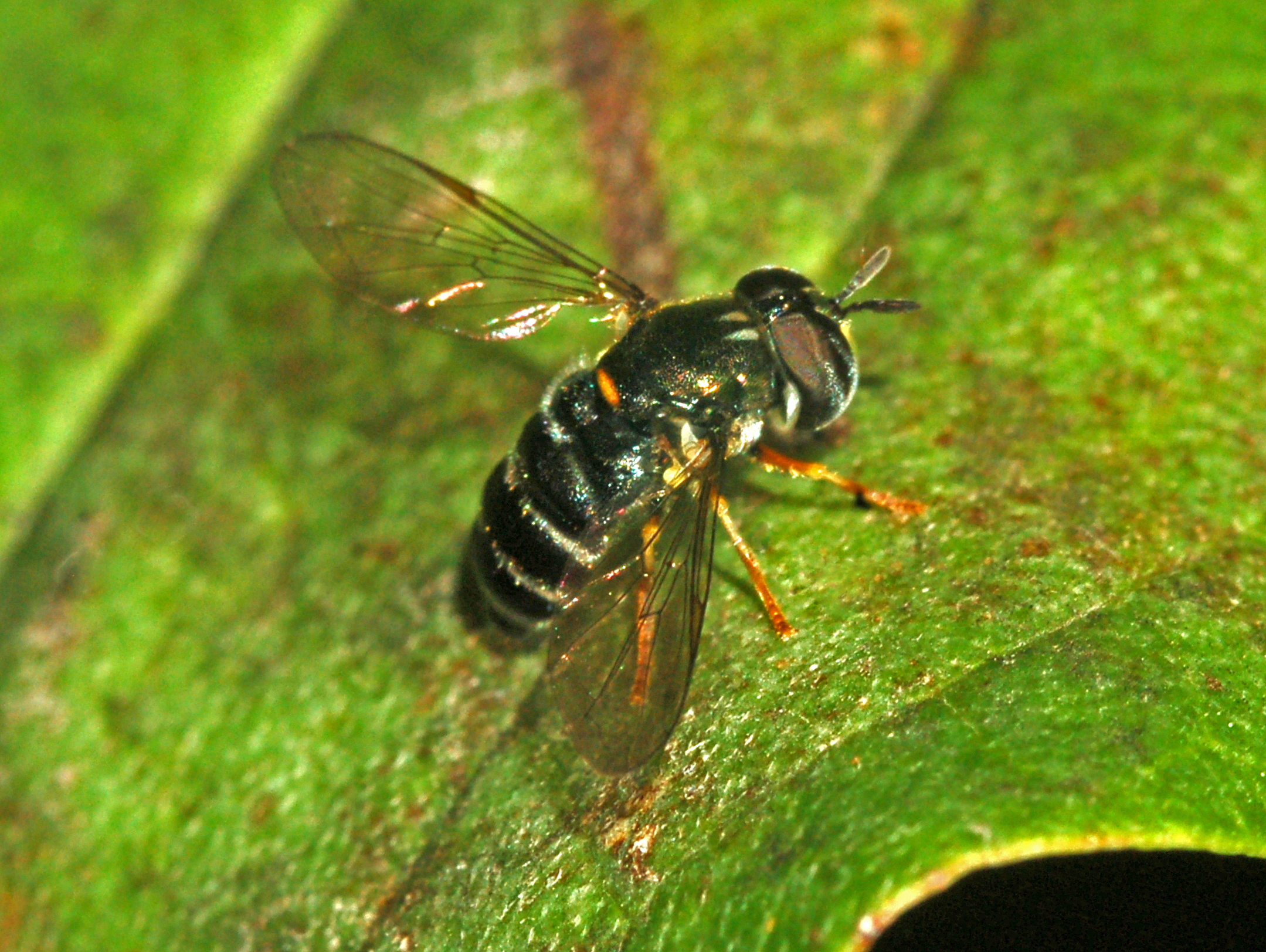 Female of Paragus cf. pecchiolii, Val Noci, Genova, Italy